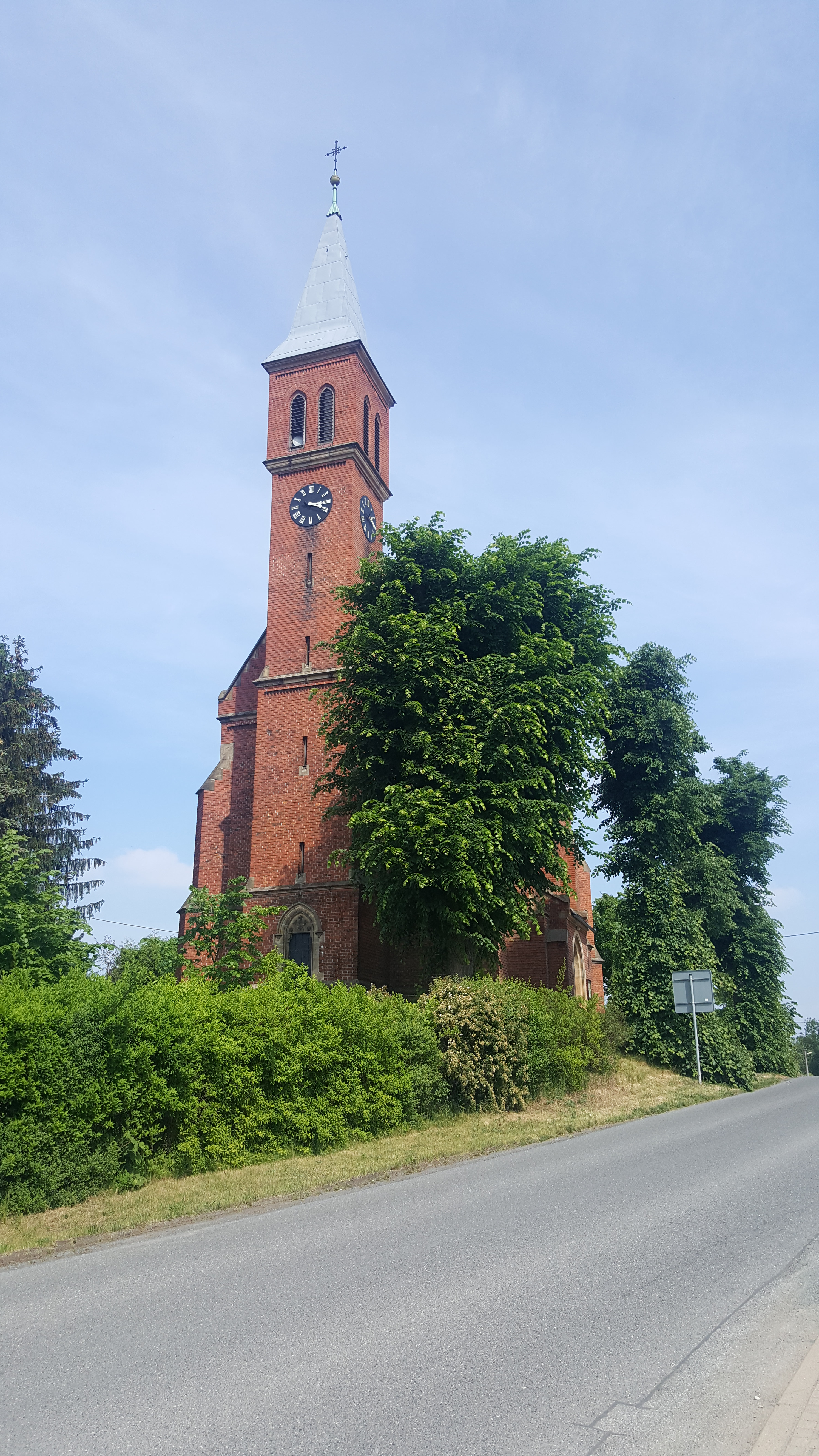 Pohled ze silnice